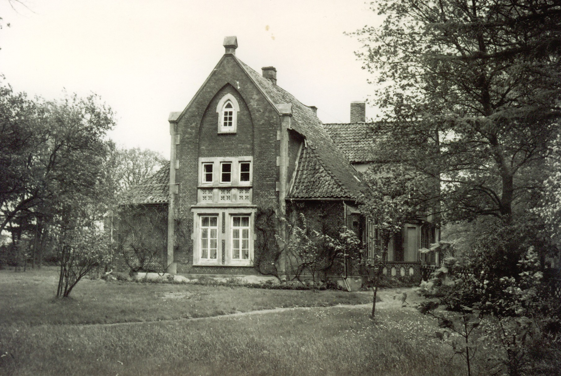 Gutswohnhaus von Gösta Hansson in Nückel bei Bremerhaven